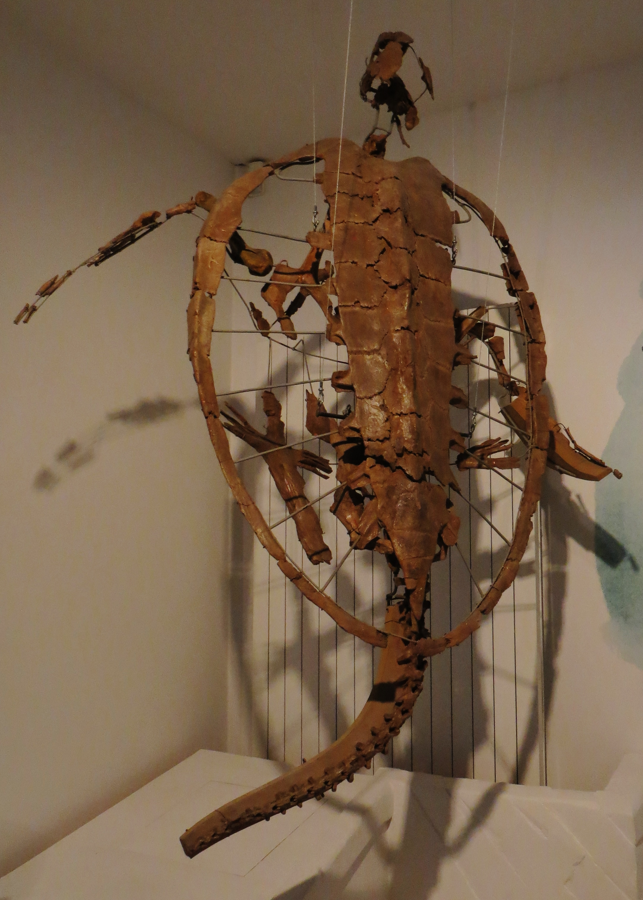 Fossil - Took The picture at Royal Belgian Institute of Natural Sciences, Brussels